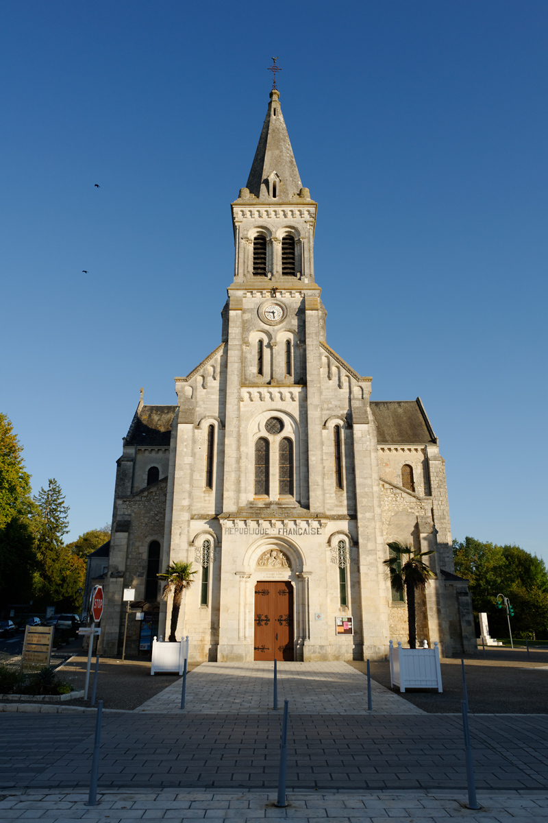 Église Saint-Sébastien de Villedieu-sur-Indre (France - Indre)